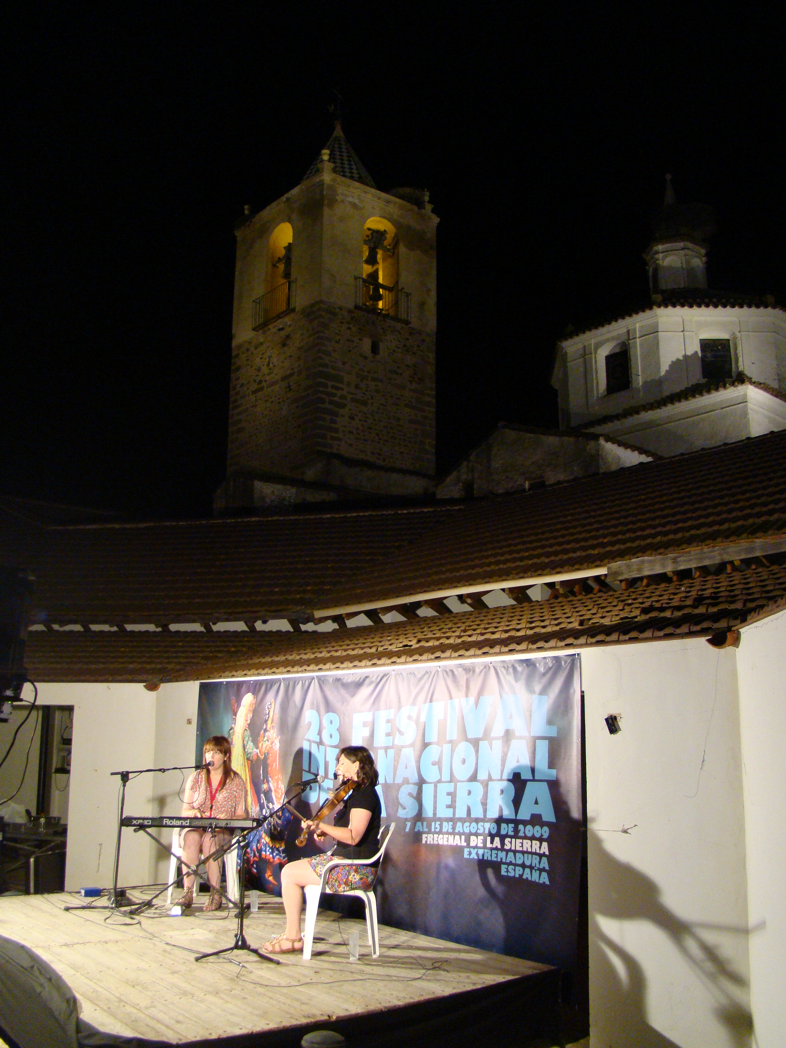 MUSICA EN EL CASTILLO